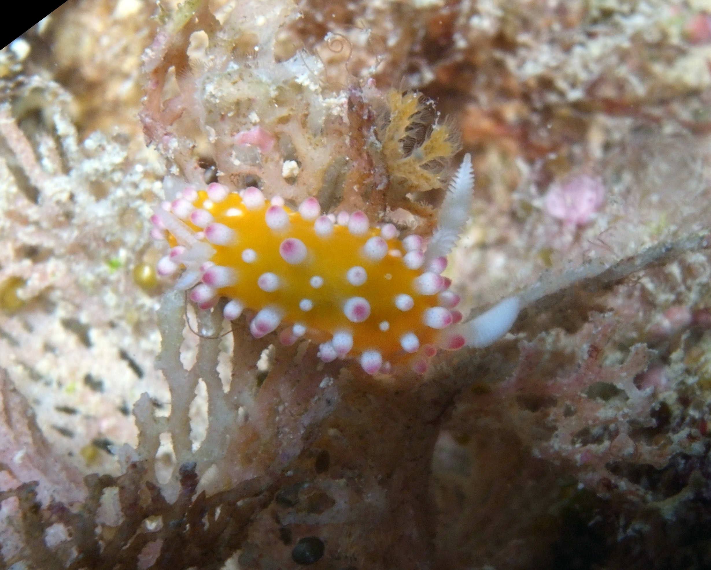 Cadlinella ornatissima, Rakiraki, División Oeste, Fiyi